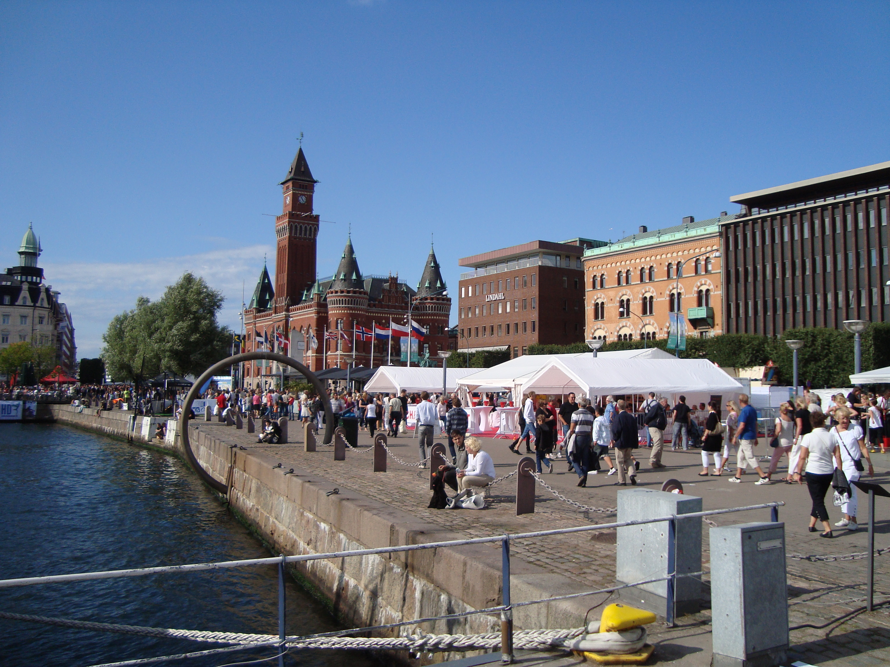 Kungstorget under Helsingborgsfestivalen 2009.